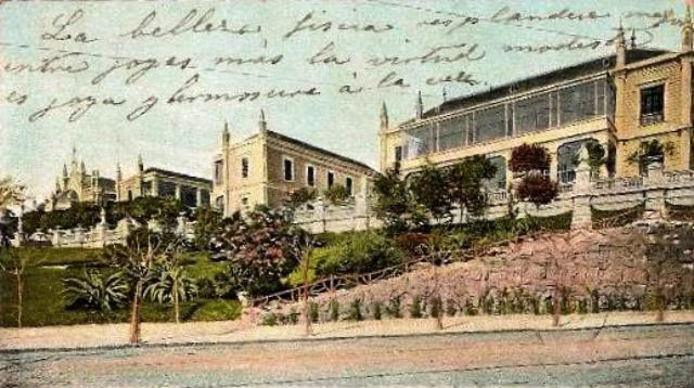 Vista del Asilo General Viamonte desde la actual Plaza Intendente Alvear y Avenida Pueyrredón. Hoy funciona allí el Centro Cultural Recoleta y el Buenos Aires Design Center. Buenos Aires, Argentina.